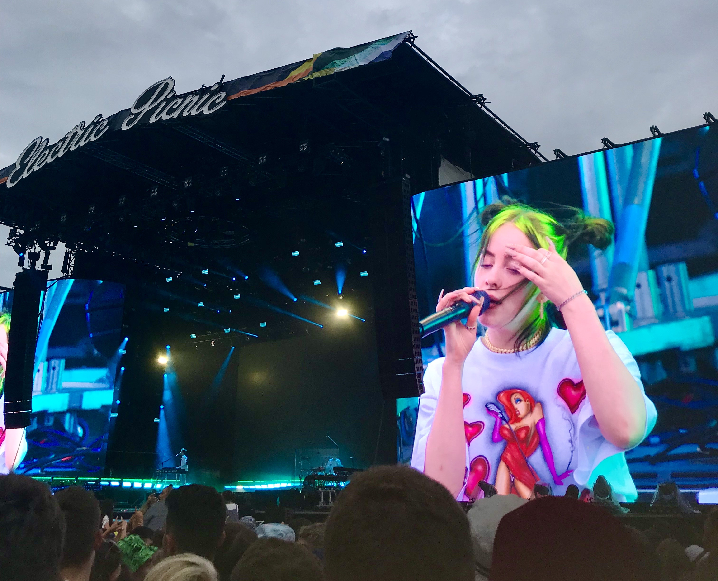 Billie Eilish playing at Electric Picnic Festival 2019